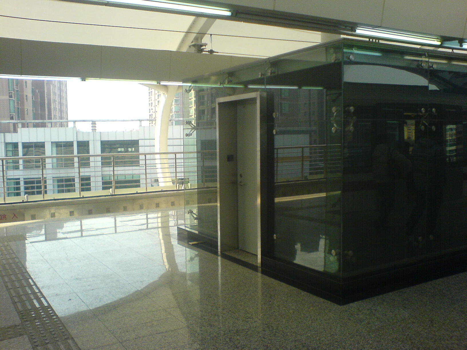 巨峰路站站台